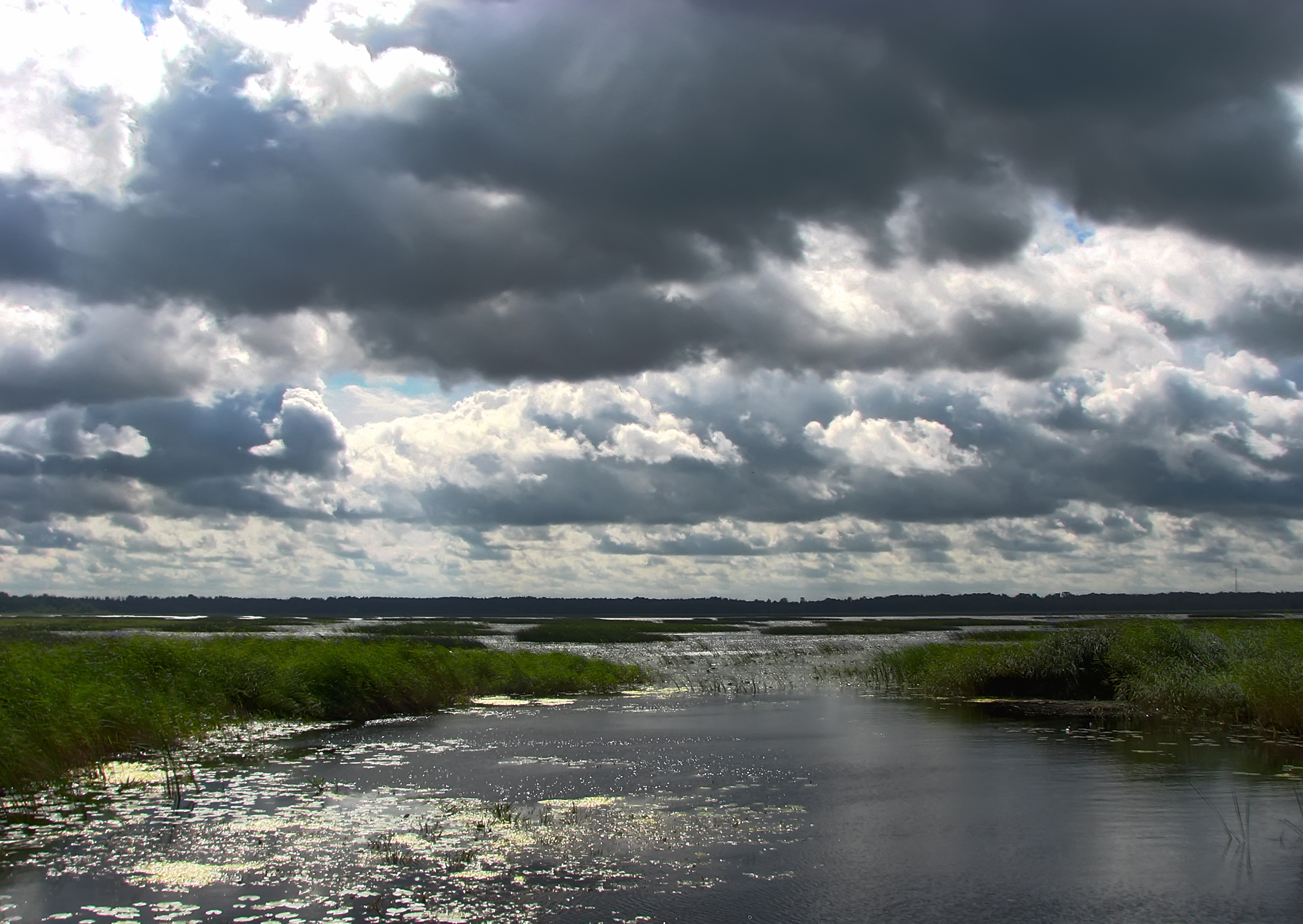 Lobes ezers